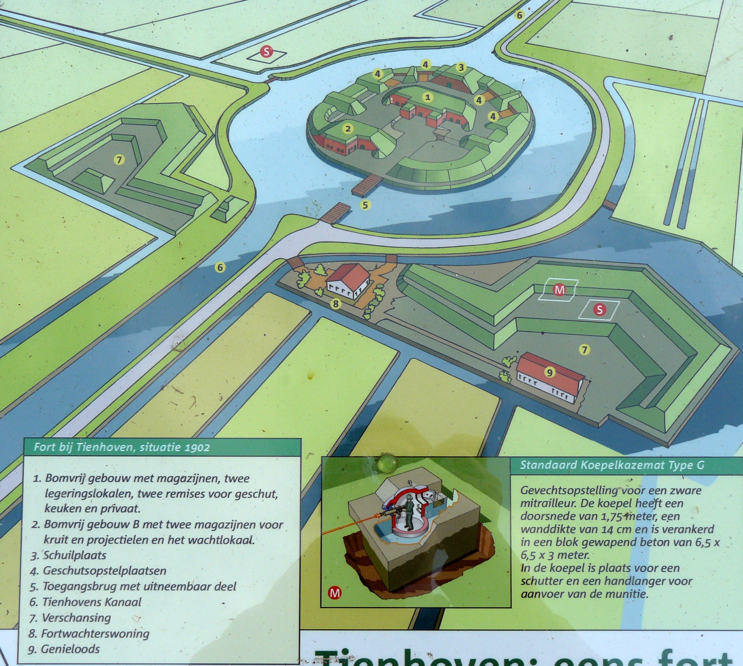 Tekening van het fort zoals het er in het begin heeft uitgezien. Het fort was aanmerkelijk groter dan het eiland, met schansen links en rechts. Foto van informatiebord bij het fort.